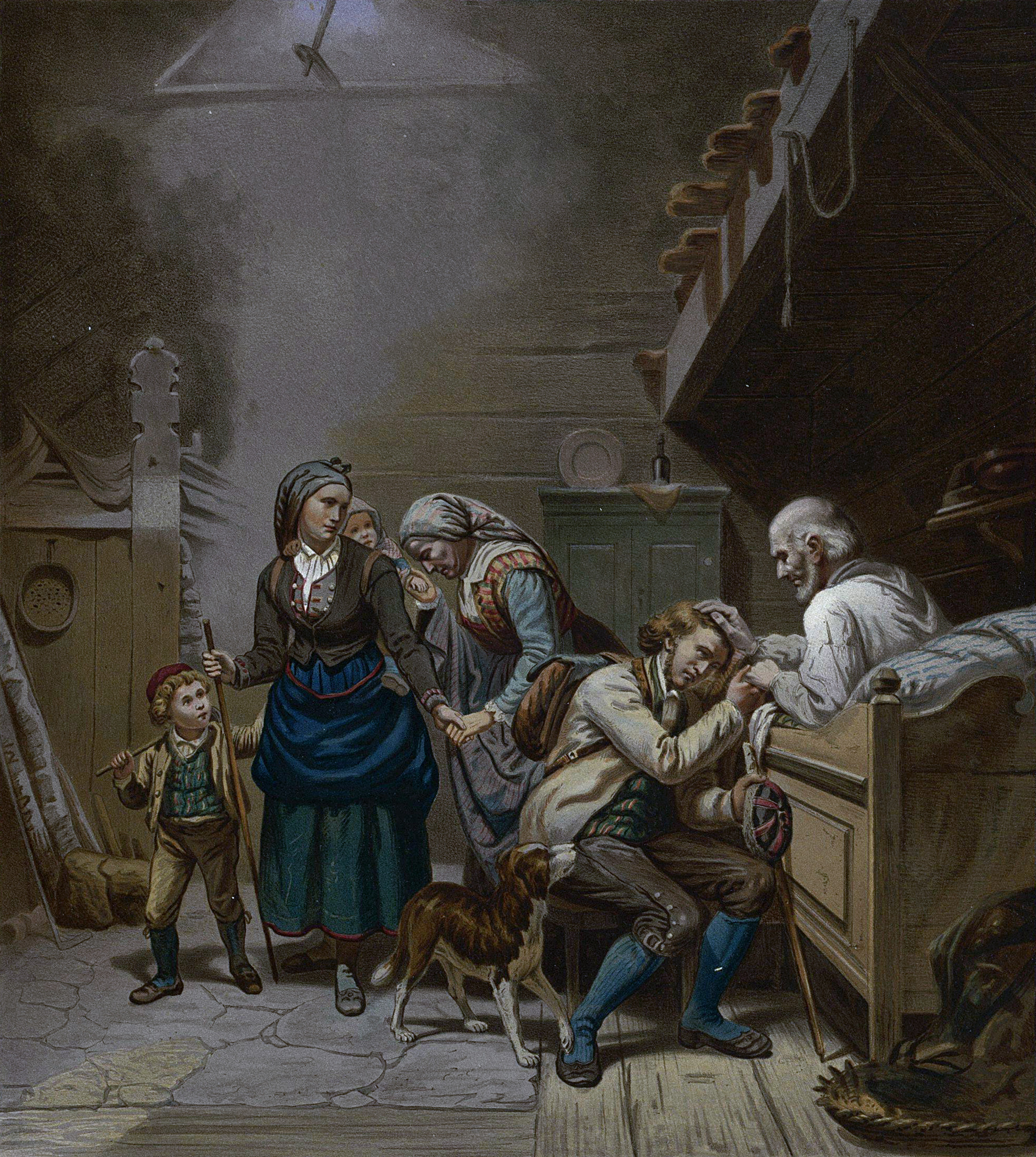 Litografi af Winckelmann & Sönner i Berlin